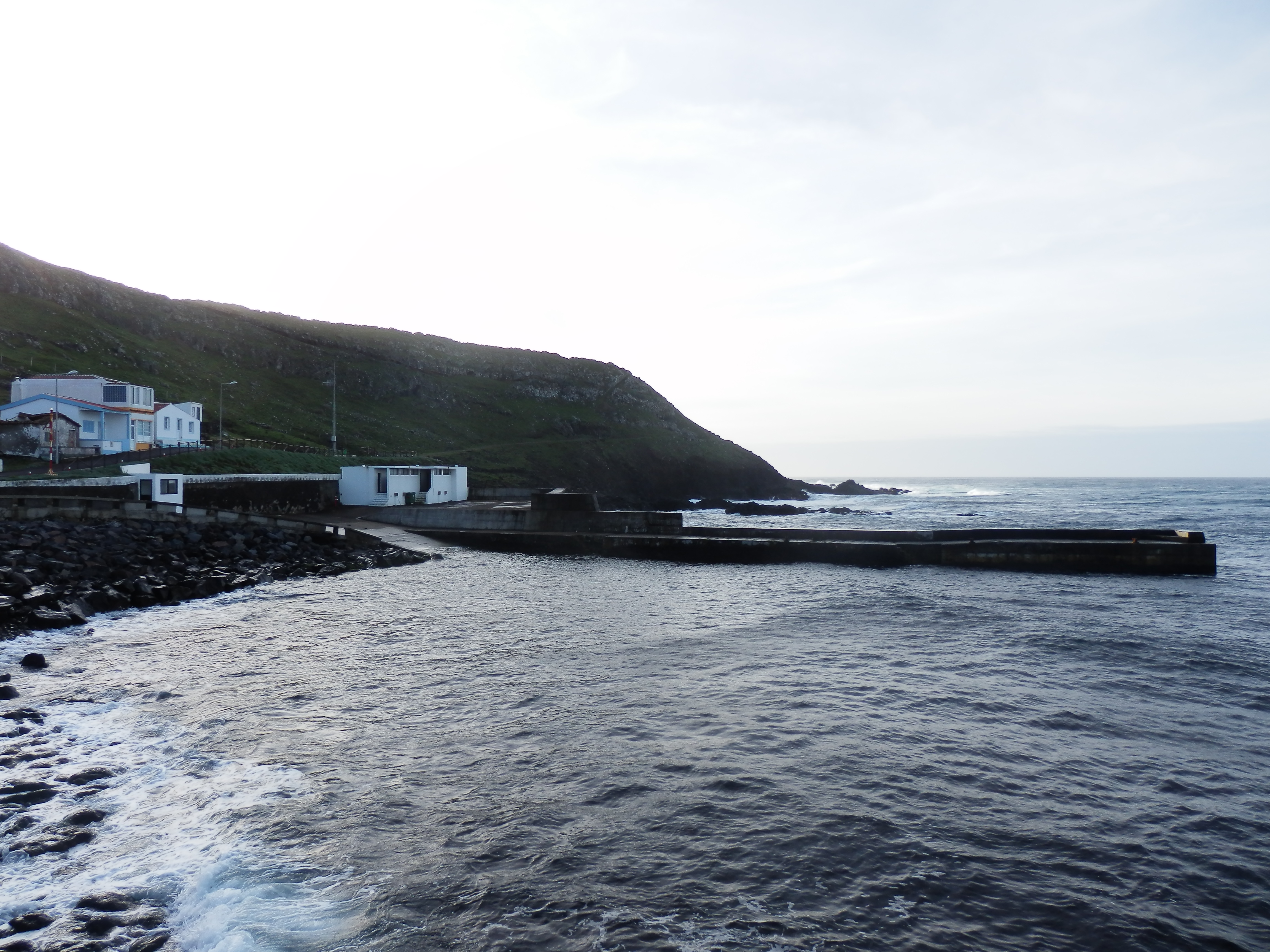 Vista do lado da piscina